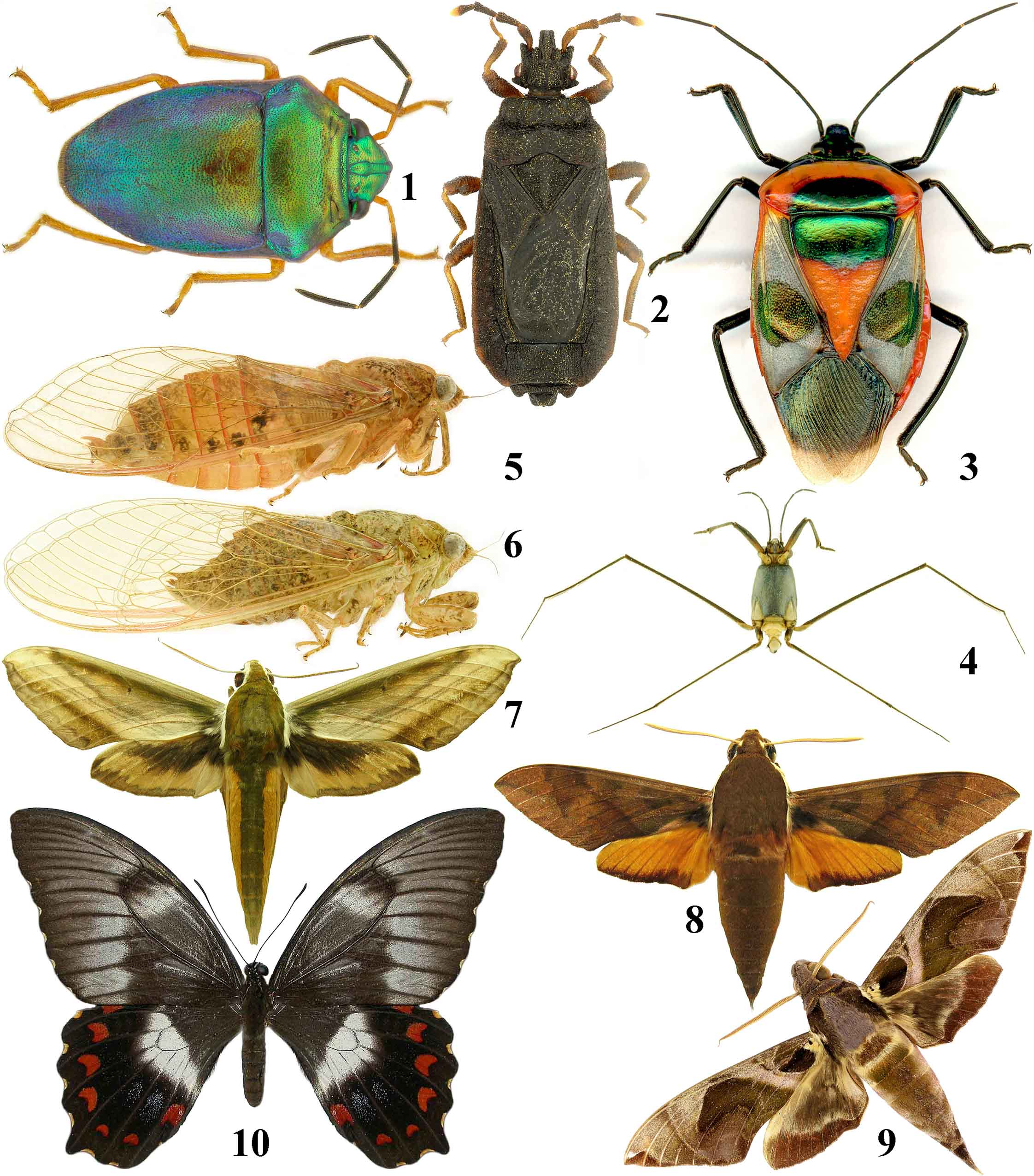 Henri-Pierre Aberlenc, Les savants de Lapérouse, la biodiversité et le peuplement de Vanikoro par les Insectes ː trois punaises et punaise marine (rivière Laurence), cigale de Lapérouse, trois sphinx et un papillon de jour.